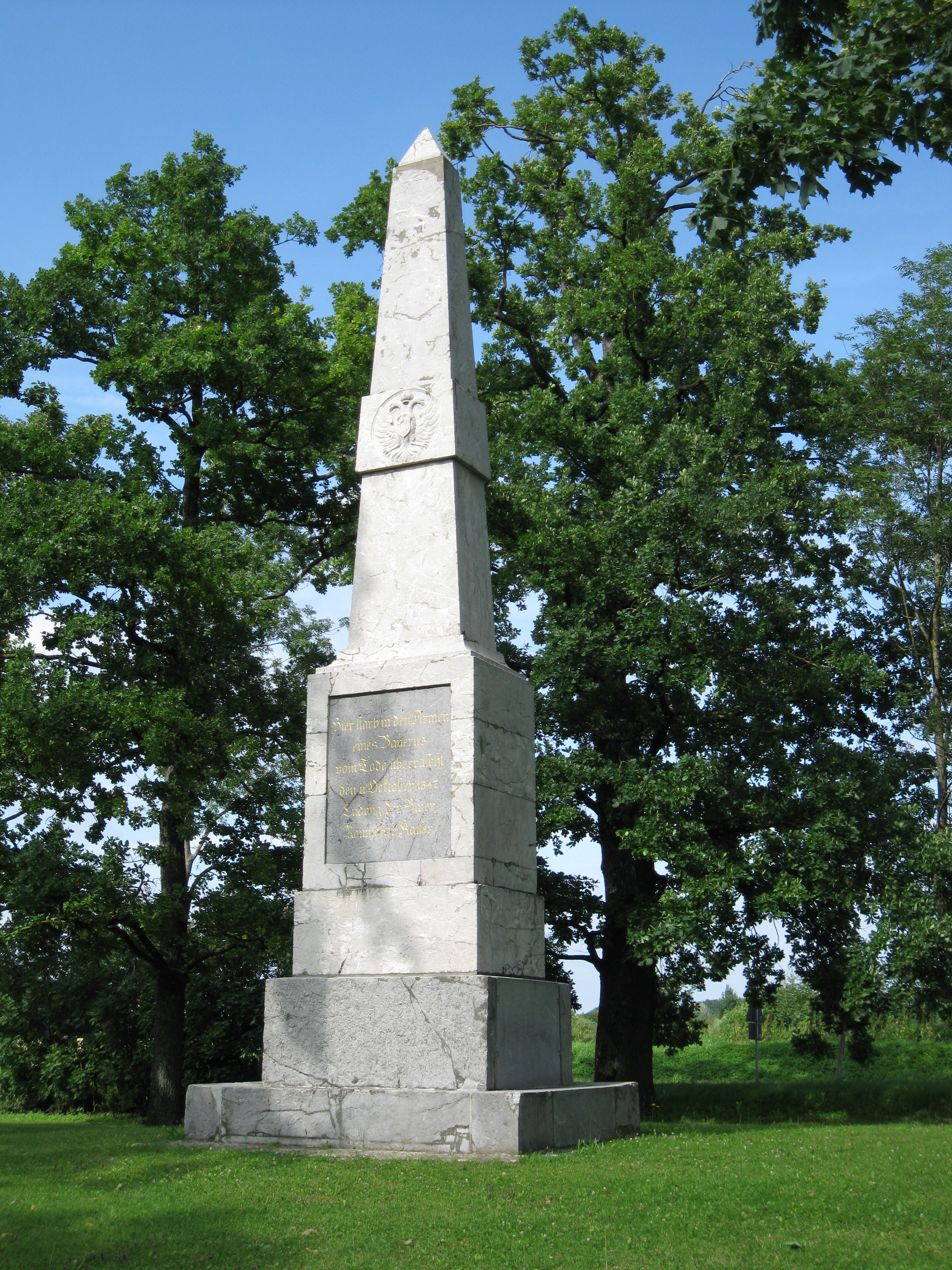 Kaiser-Ludwig-Säule in Puch, near Munich